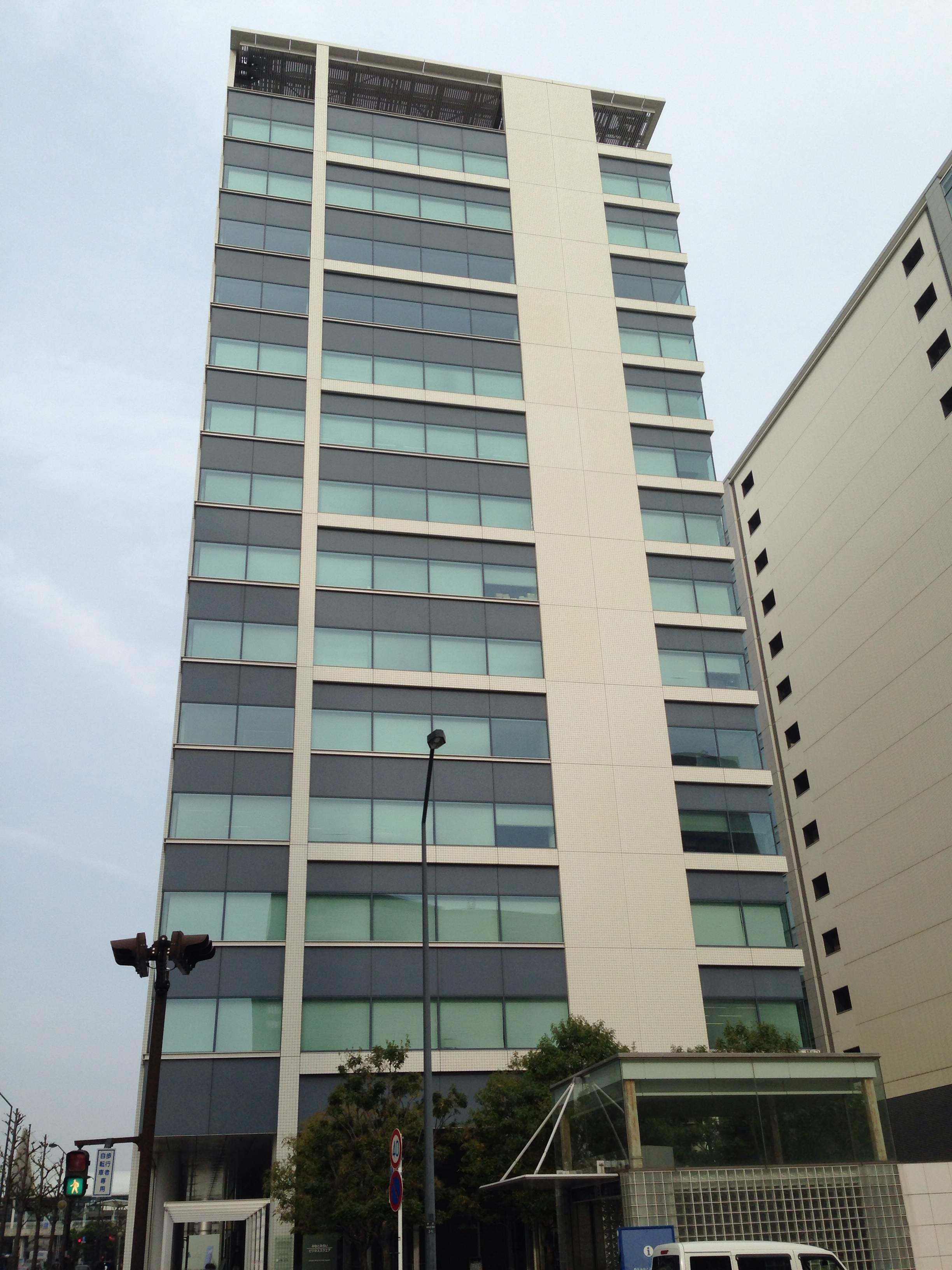 横浜みなとみらい地区の33街区北区画にあるオフィスビル「みなとみらいビジネススクエア」（事業者：東京海上日動火災保険、竣工：2004年8月、階数：地上14階）。